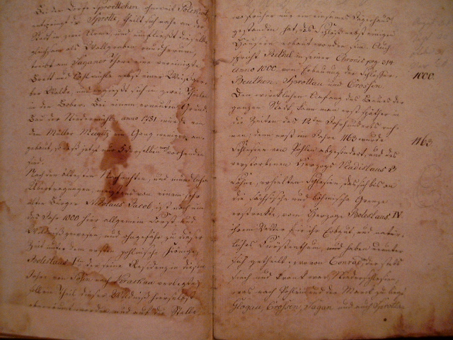 Strony z kroniki Szprotawy spisanej w XVIII wieku przez nieznanego autora, przechowywanej w Muzeum Ziemi Szprotawskiej.